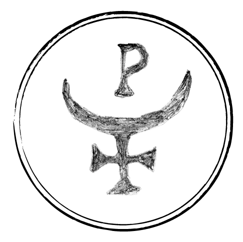 Własnoręczny szkic herbu Podhajec na podstawie ilustracji z: Підгайці Та Підгаєччина. red. С. Колодницький. Тернопіль: ТзОВ «Терно-граф», 2012, s. 120